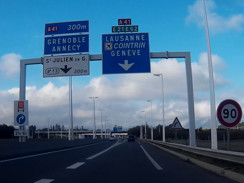 Panneaux routiers français C117-b21c1, M11c1, D41c, Da31a, Da31c, A1a et B14.